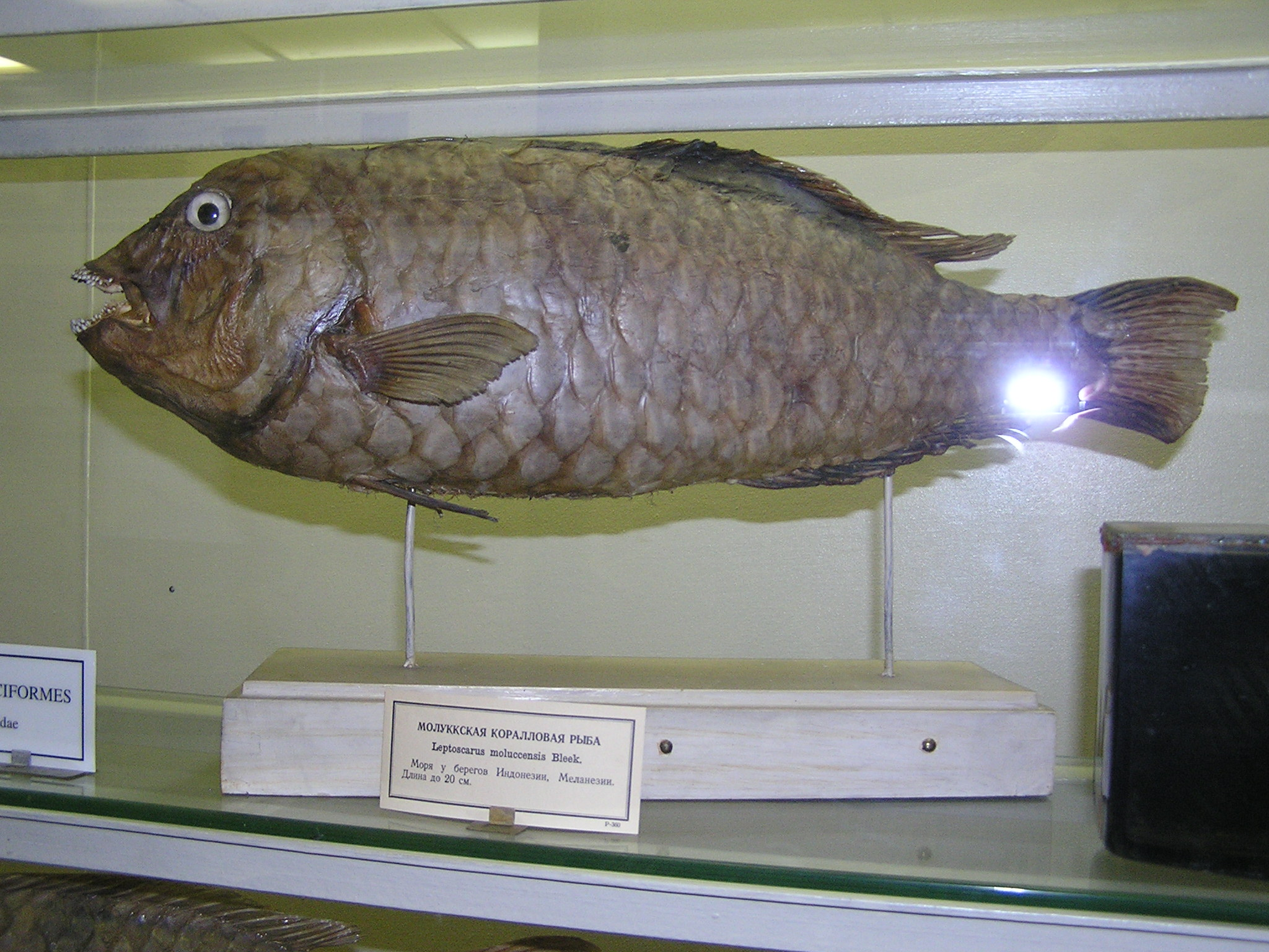 Leptoscarus moluccensis